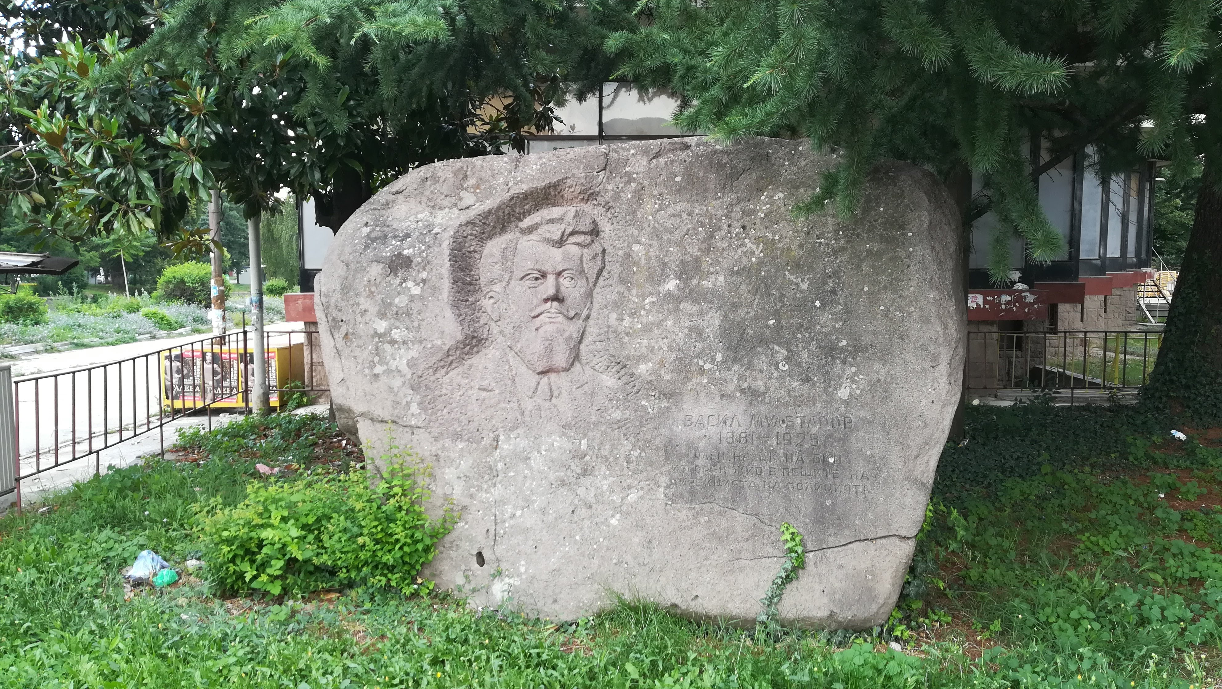 Паметник на Васил Мулетаров в град Пещера до едноименният обувен завод.